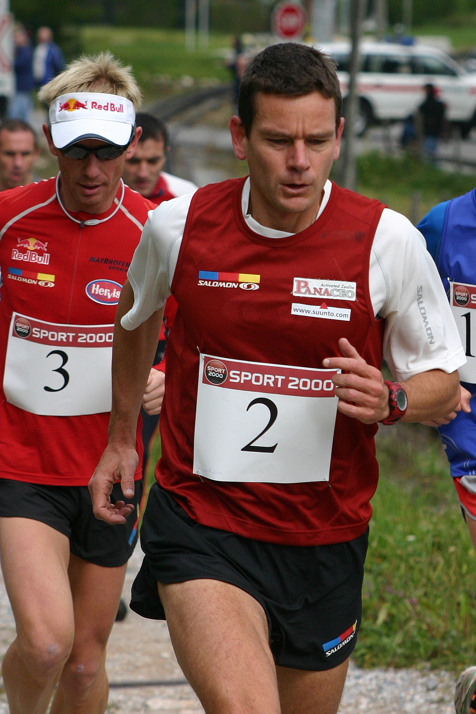 Berglauf-Weltmeister Jonathan Wyatt (Neuseeland, Nr. 2) Schneeberglauf 2008 von Puchberg am Schneeberg auf den Hochschneeberg